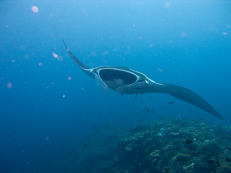 Manta Ray (Manta birostris) at Hin Daeng, Thailand.